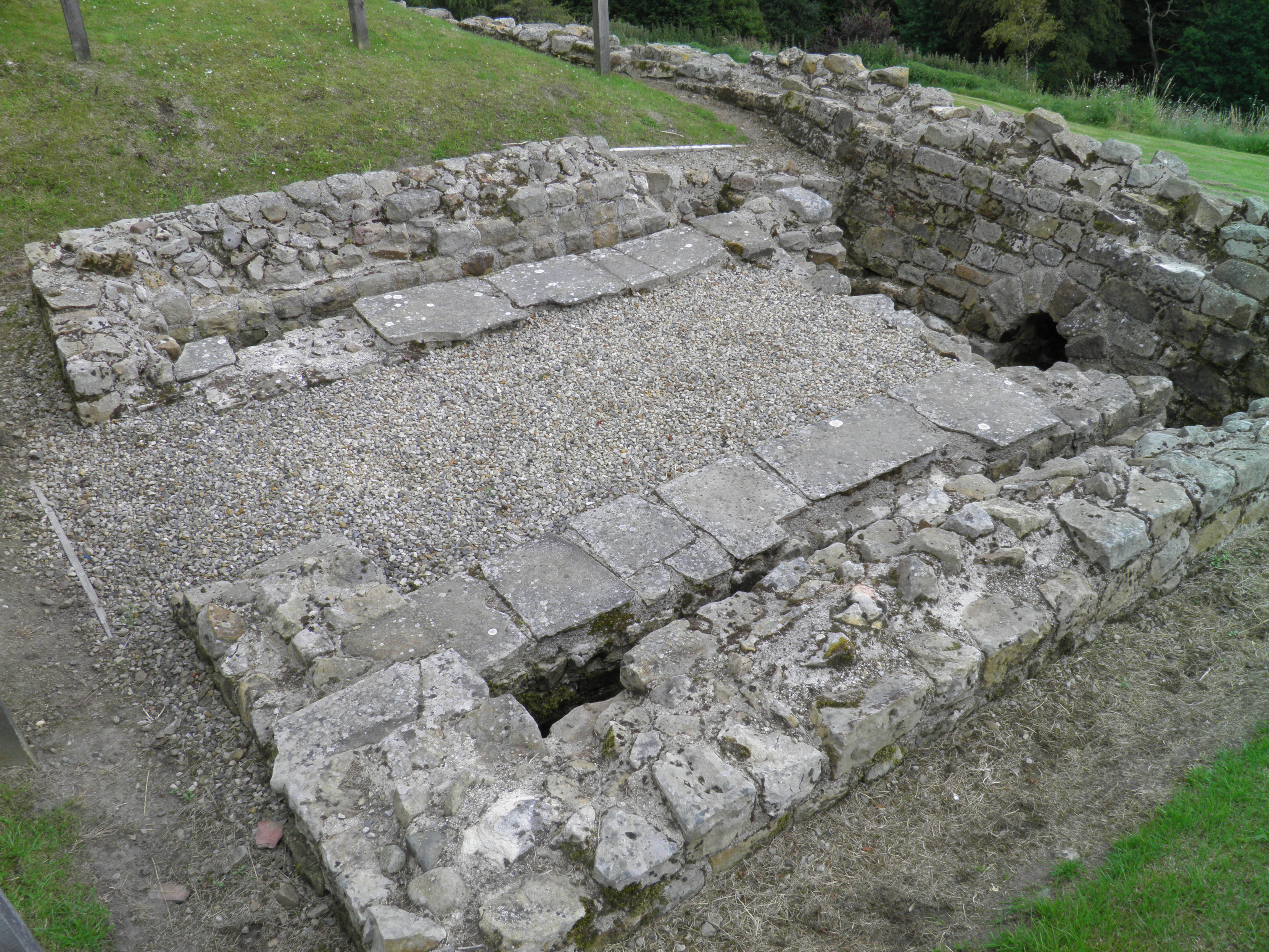 Vindolanda fort, UK